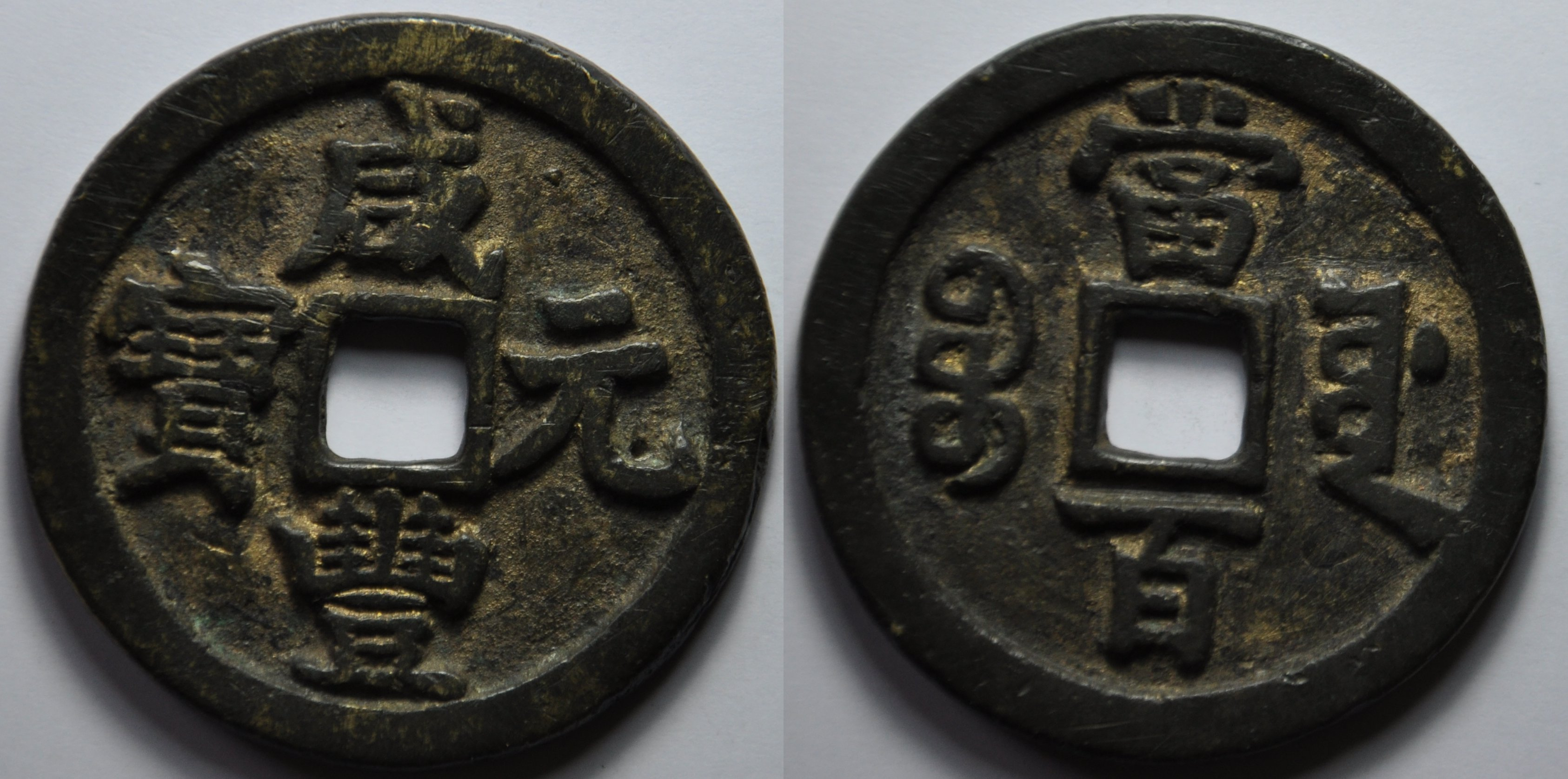 Une monnaie de 50 cash de l'empereur Wen Zong (1851-61), dynastie Qing (1644-1912) de l'atelier du ministère des travaux publics à Pékin. A/ Xian Feng zhong bao (Monnaie lourde de Xian Feng) R/ Bao yuwan, Dang bai (valeur 100) Poids 34.7 g. Diamètre 47.9 mm Référence H22.762 Il y a de fortes chances que cette monnaie ne vienne pas d'un atelier officiel, peut-être d'un atelier privé ou que ce soit une fausse monnaie d'époque car le poids est trop léger d'environ 10 grammes.